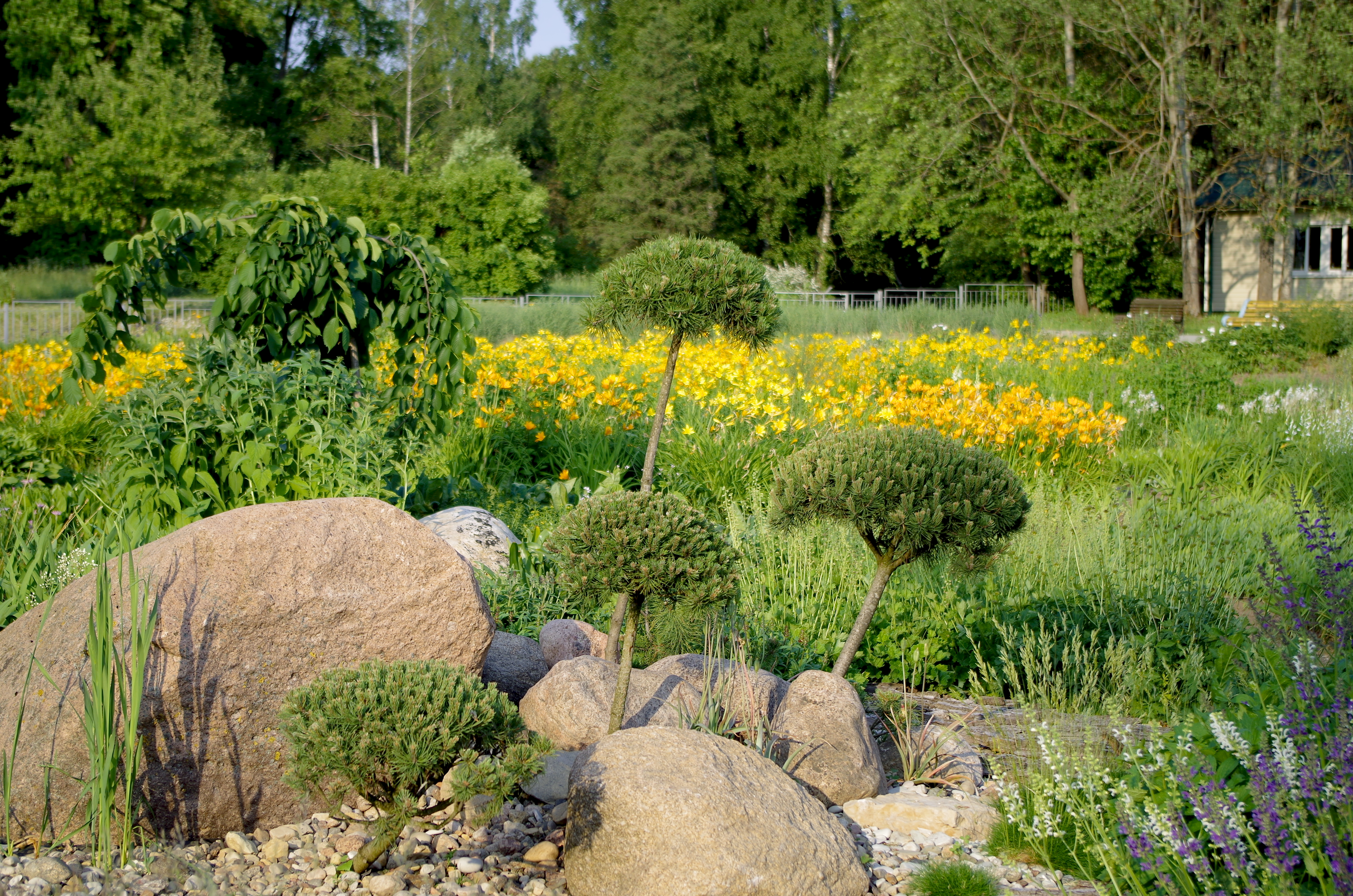 Ботанический сад, Минск